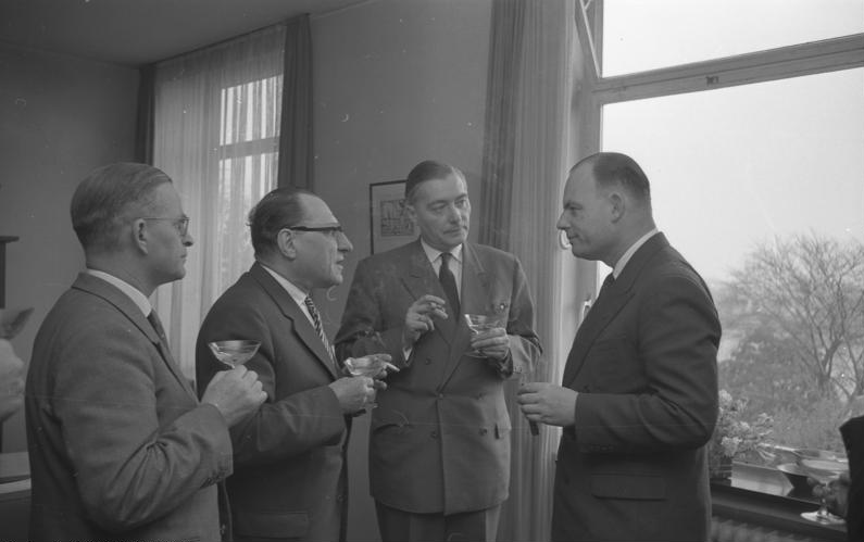 Deutsch-Neuseeländisches Handelsabkommen im Auswärtigen Amt